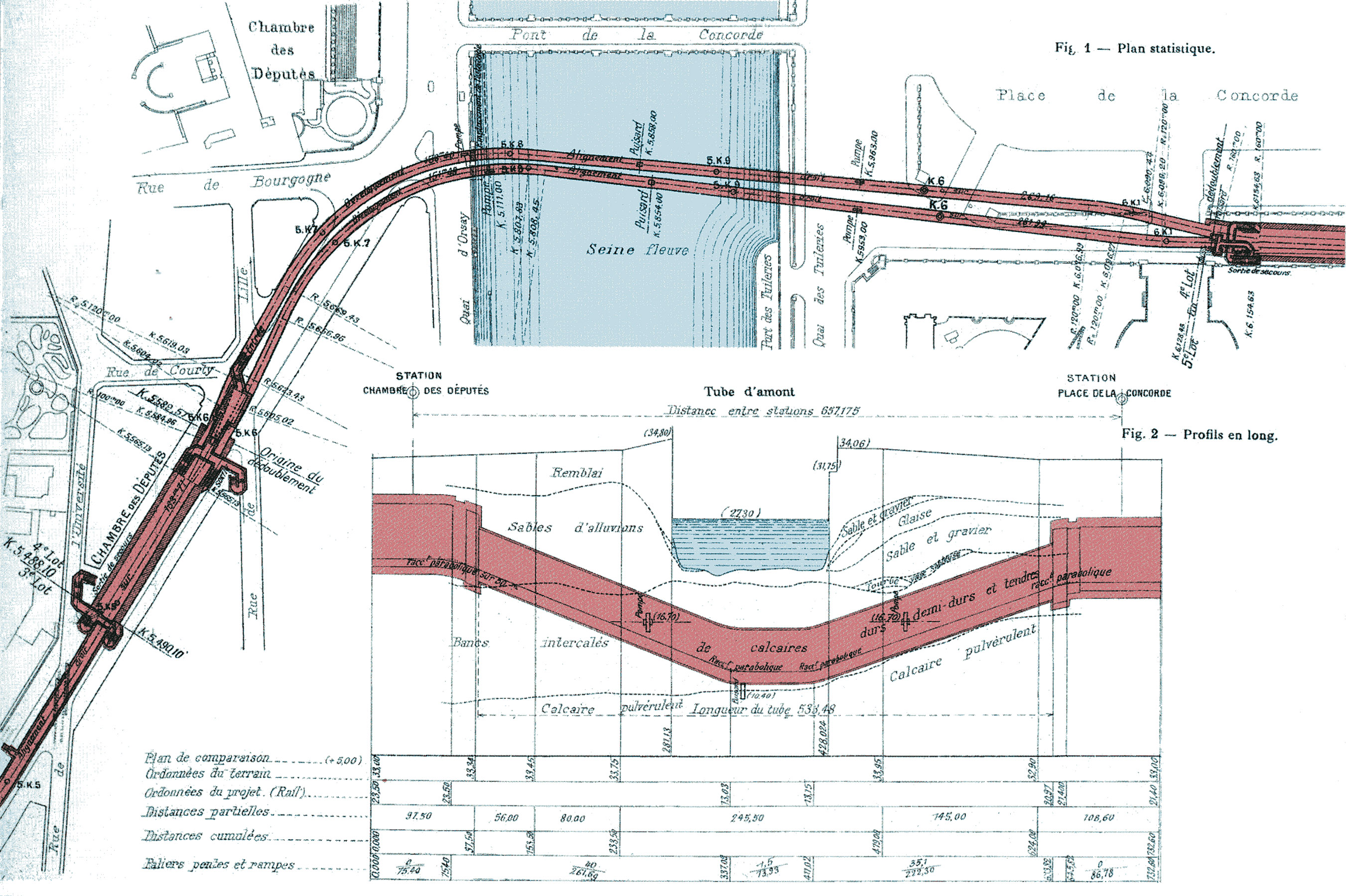 Ligne A du Nord-Sud (actuelle ligne 12 du métro de Paris), France. Profil en long et en plan de la traversée sous-fluviale.